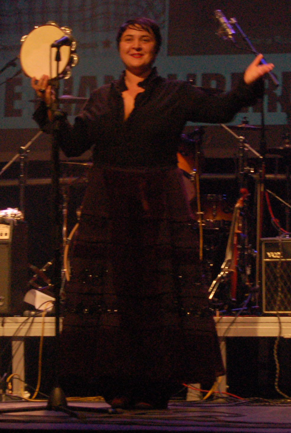 Ugia Pedreira na sala Nasa de Santiago de Compostela